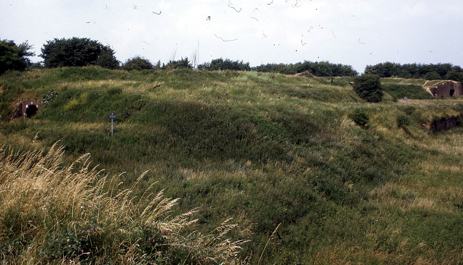 De overgroeide vestingwerken in de Linie van Du Moulin in Maastricht. Fotocollectie RHCL Maastricht, GAM 8694.